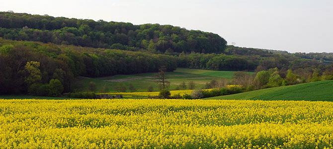 Paysage vigy